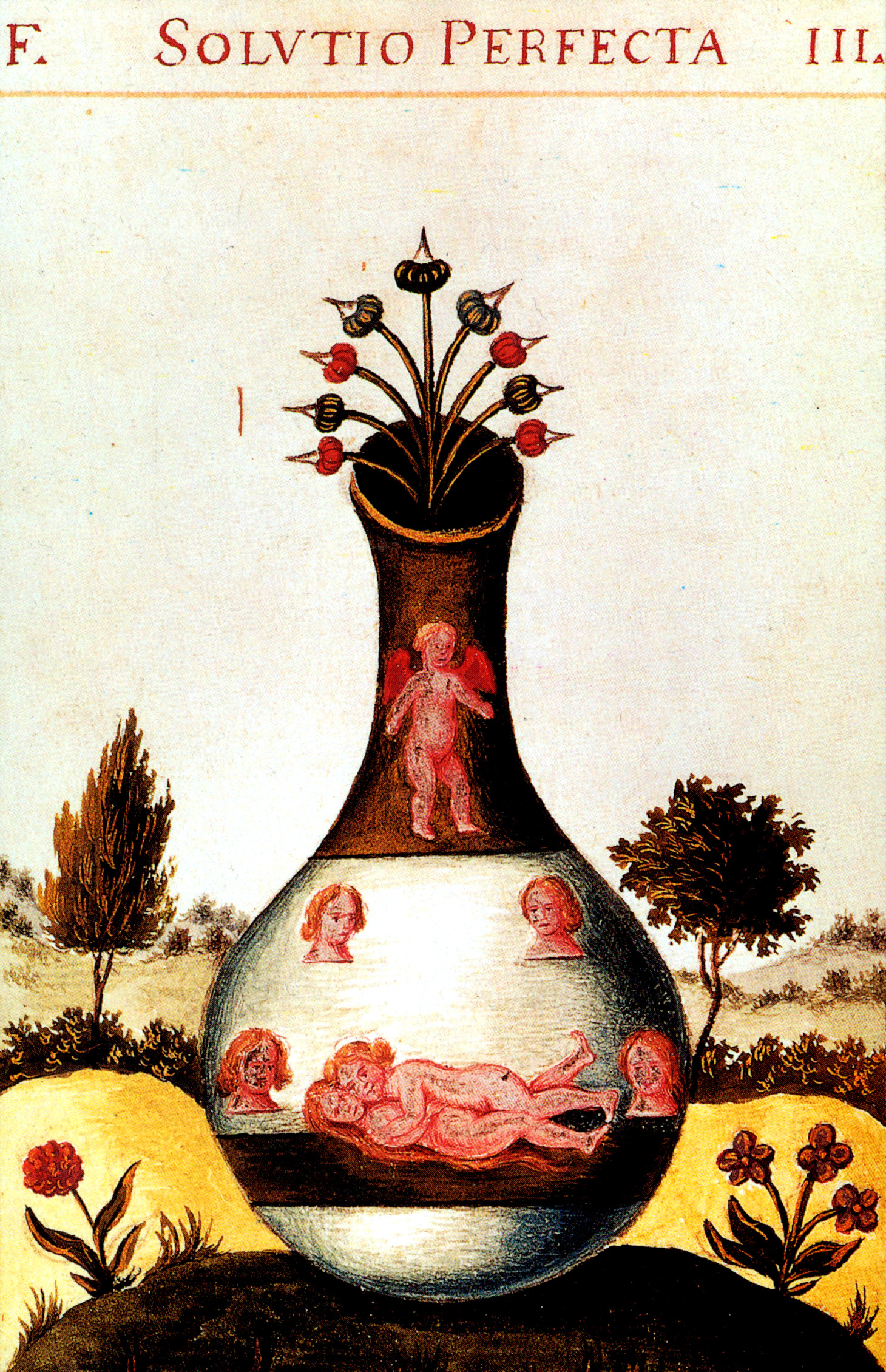 SOLVTIO PERFECTA